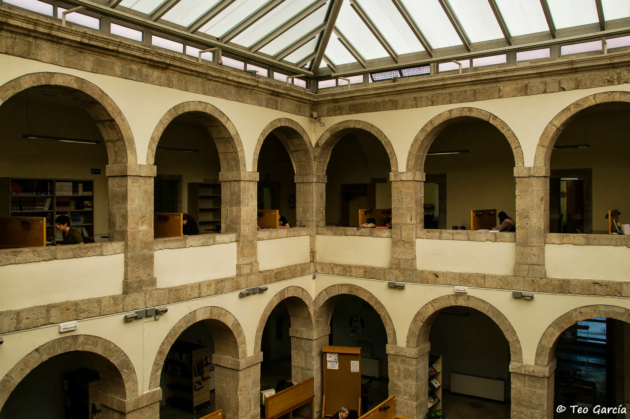 Esta imagen muestra el interior de la Biblioteca Reina Sofía de Valladolid, en concreto su patio, formado por arcos de medio punto y pilares cuadrados.